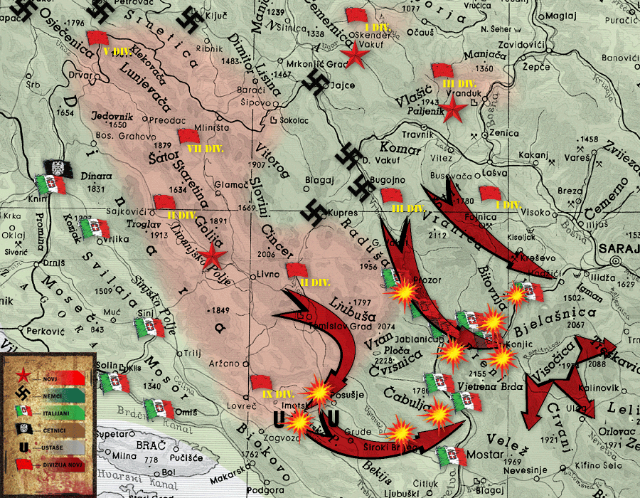 План Врховног штаба за пробој Прве, Друге и Треће дивизије преко Неретве кроз италијанску одбрану